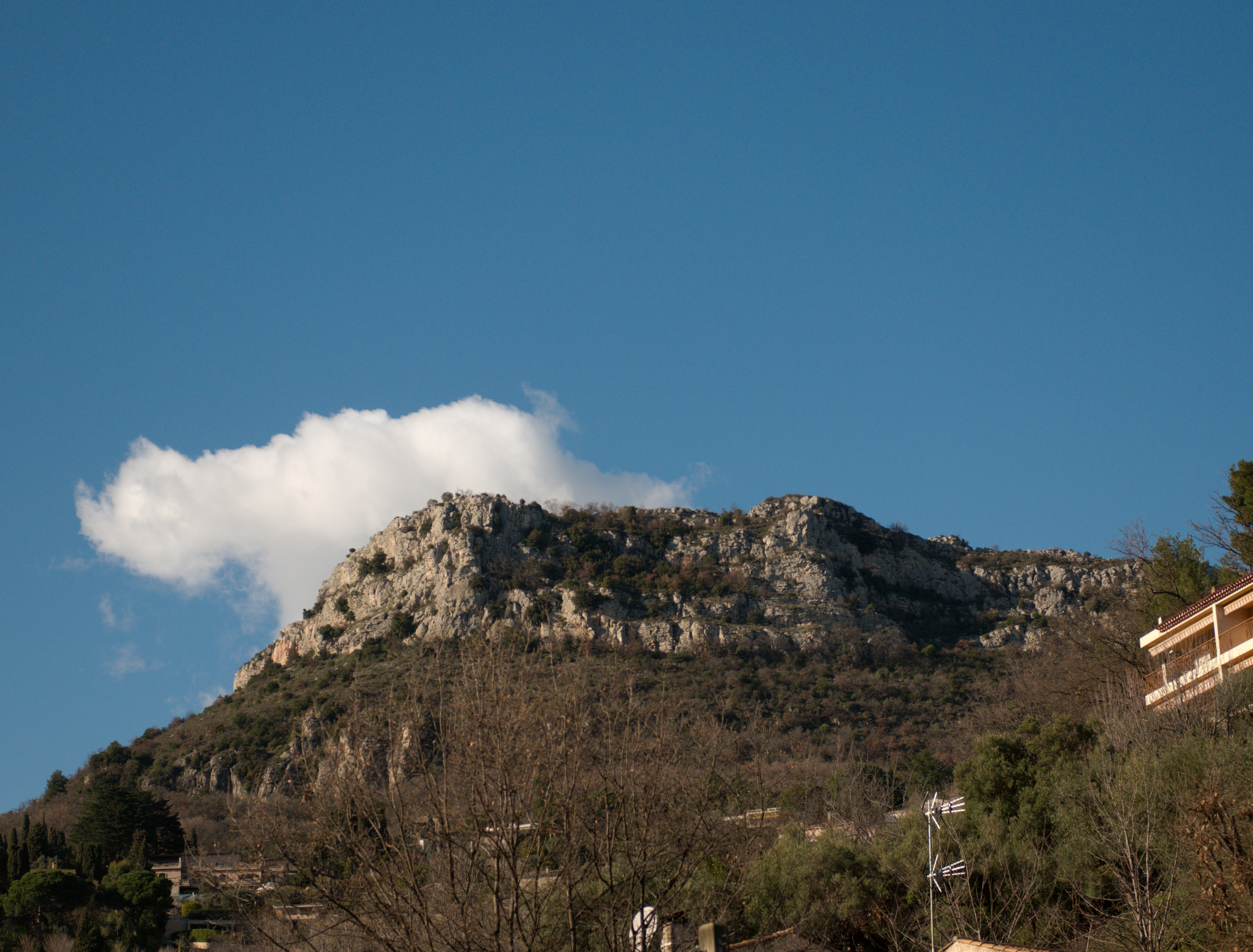 Baou des blancs depuis Vence.